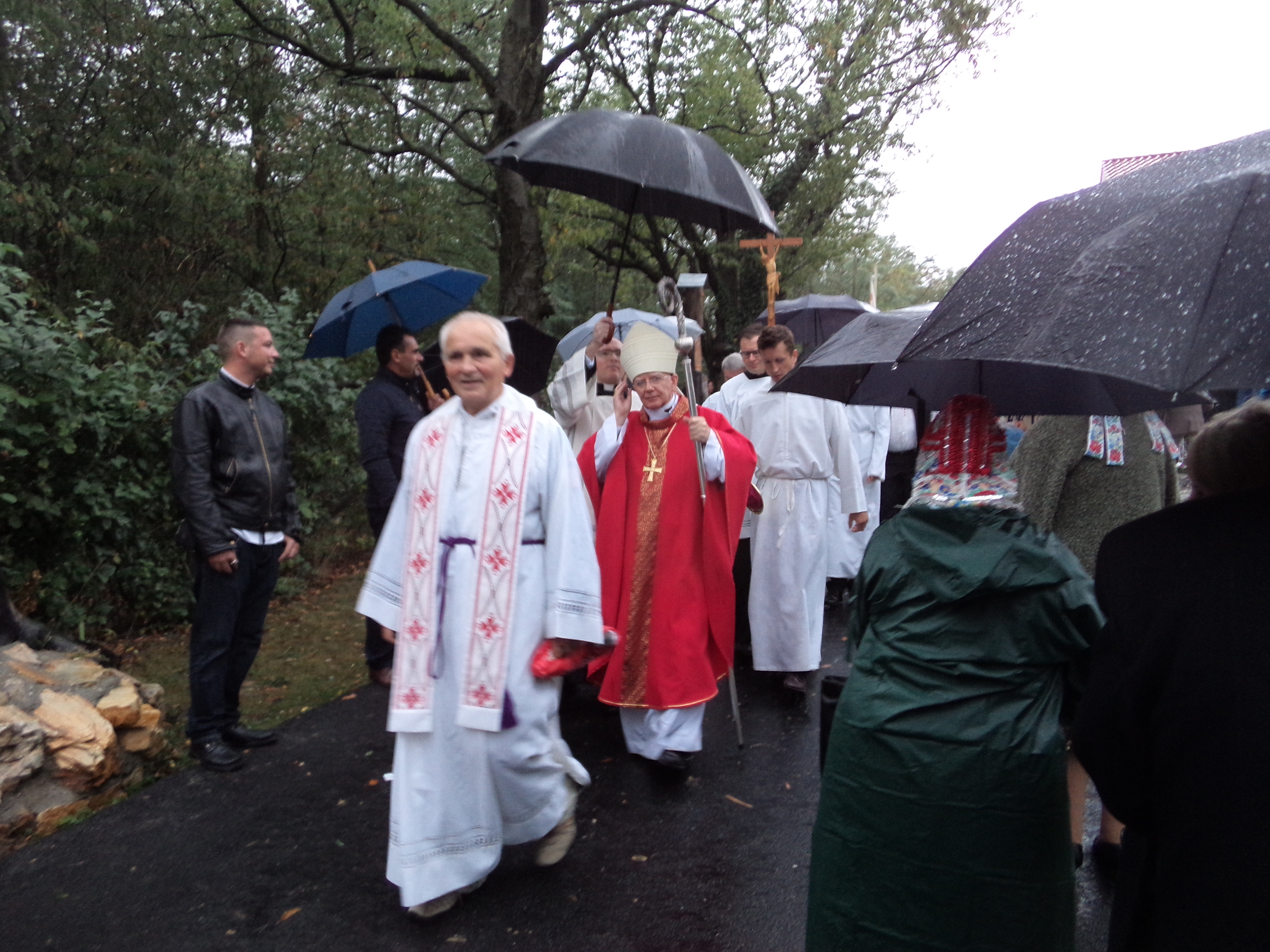 Esterházy János újratemetése az alsóbodoki Szent Kereszt Felmagasztalása-kápolnában 2017. szeptember 16-án